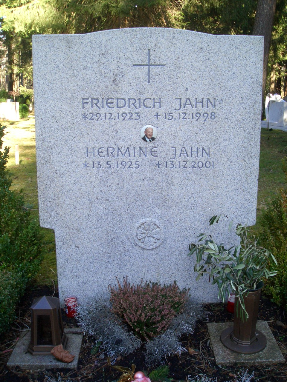 Grabstein des "Wienerwald"-Gründers Friedrich Jahn auf dem Waldfriedhof Grünwald